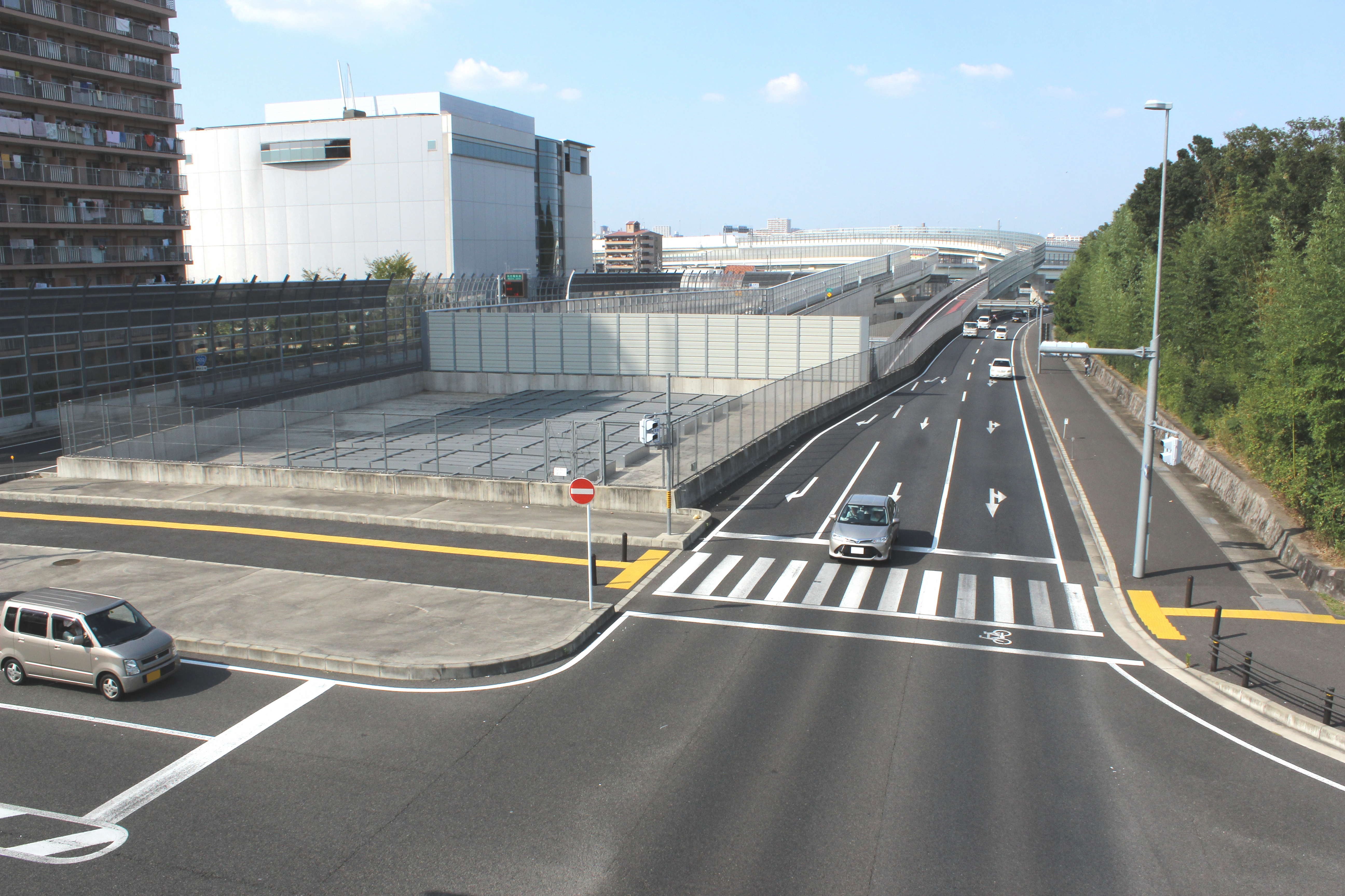 名古屋市名東区の国道302号。右は牧野ヶ池緑地、正面は高針JCT。